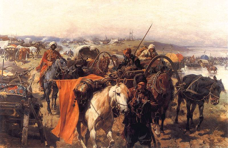 Табір Запорожців.